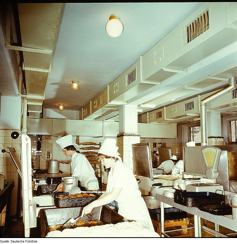 Original image description from the Deutsche FotothekWerkküche